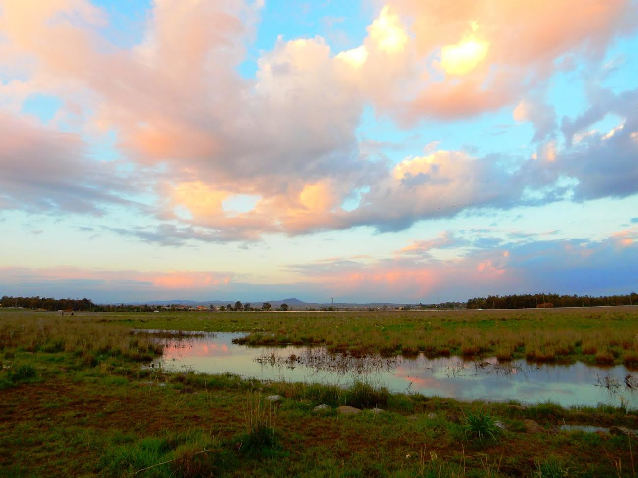 שמורת אחו נוב בכניסה לחספין